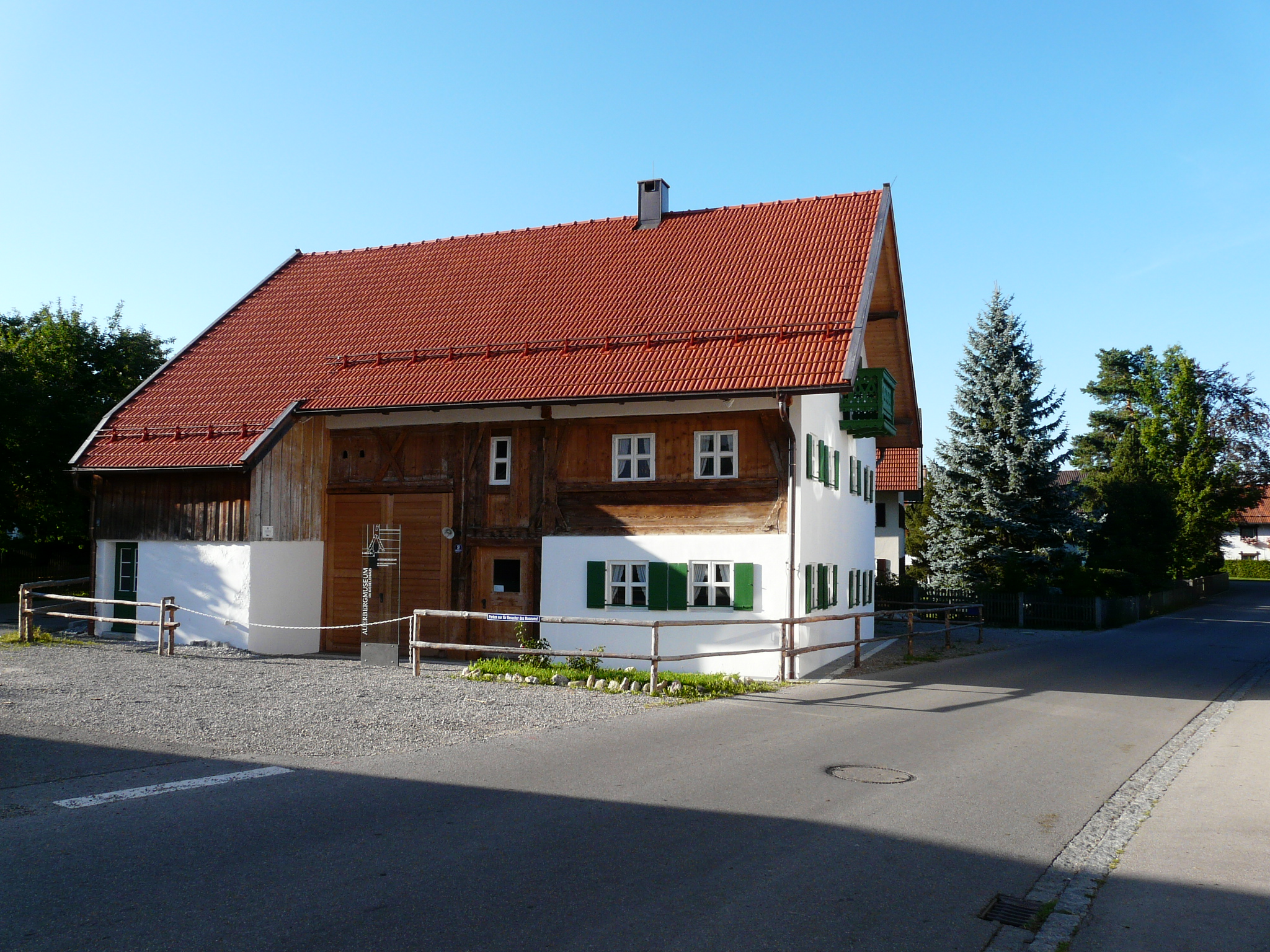 Mühlenstr. 9, Bernbeuren